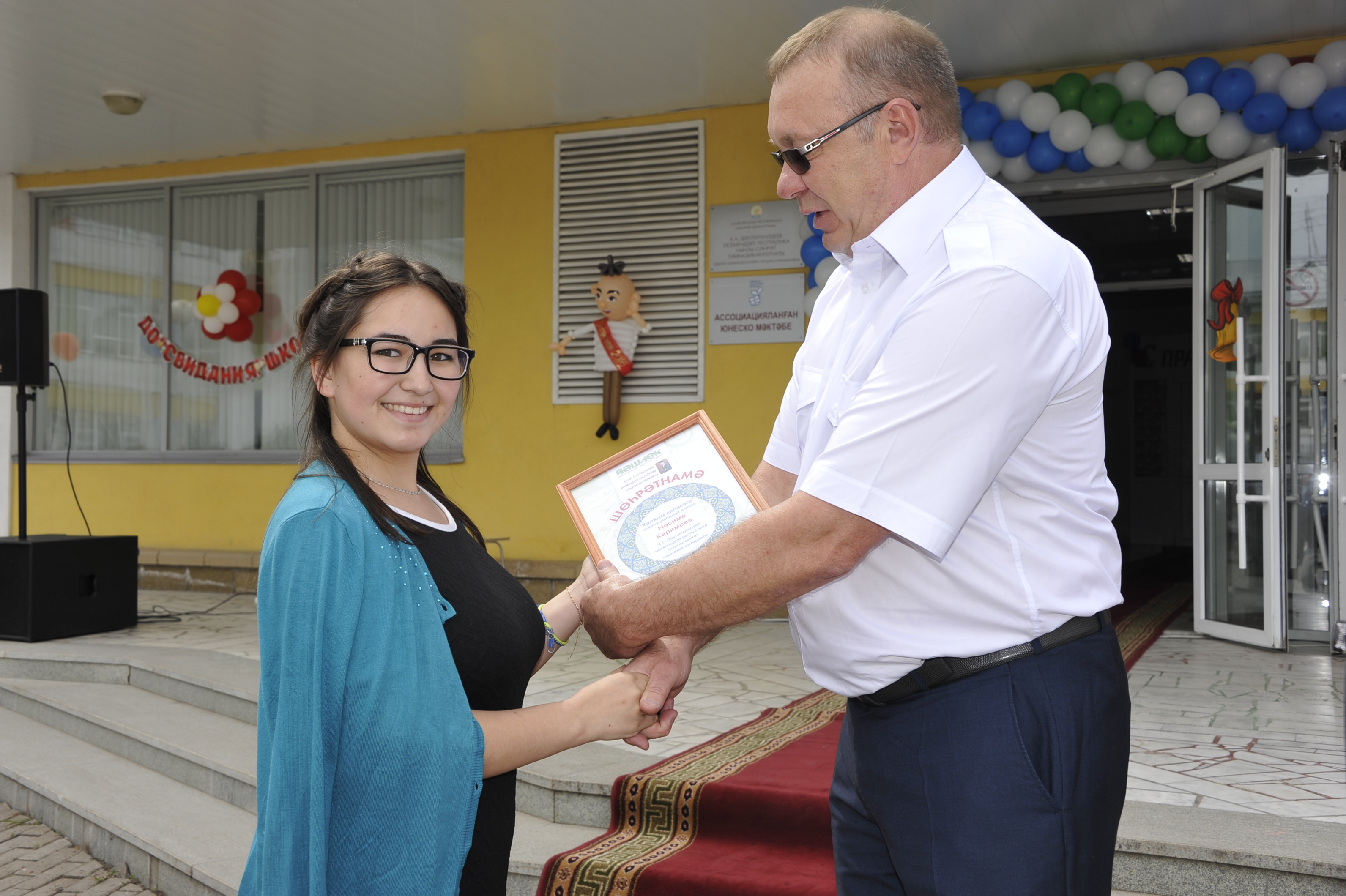 Вручение премии им.Булата Султангареева